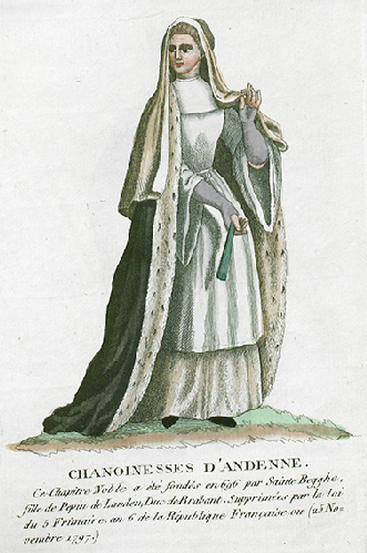 Collection de costumes de tous les ordres monastiques, supprimés à differentes époques, dans la ci-devant Belgique, Bruxelles, Philippe Joseph Maillart et sœur, 1811